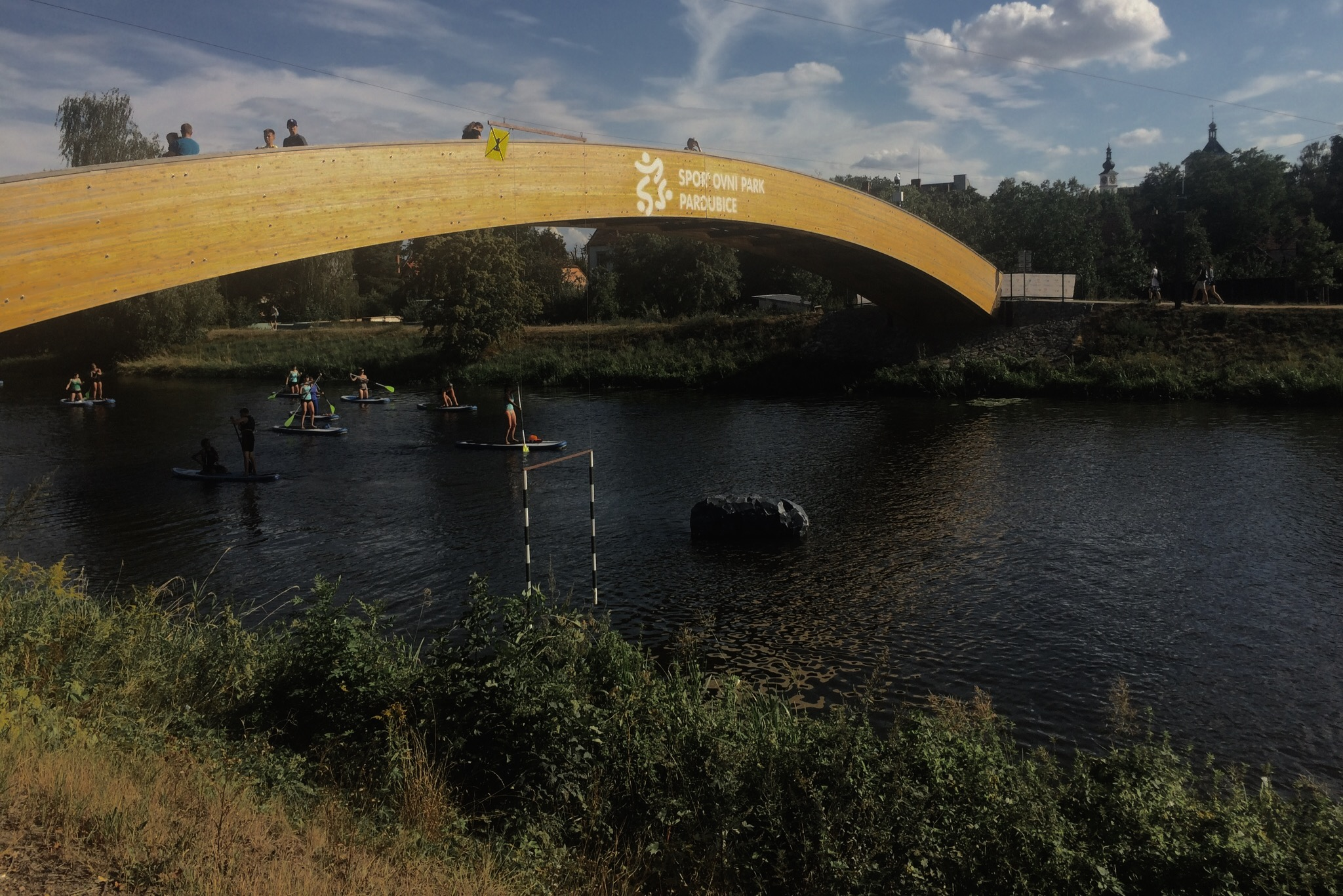 Lávka přes řeku Chrudimku s logem Sportovní park Pardubice. Lávka vede do pardubického parku Na Špici.